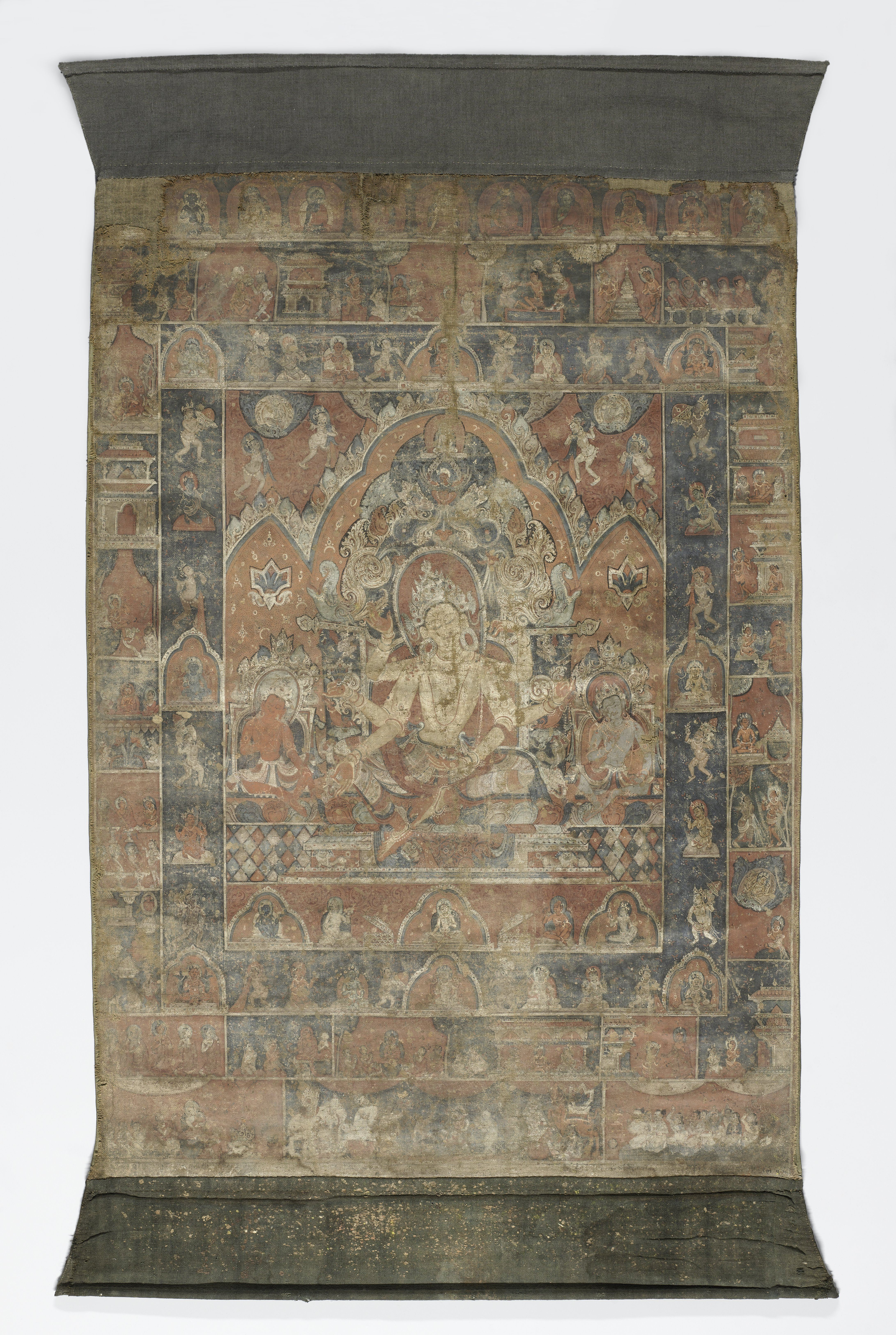 IdentificatieTitel(s): Schildering op doek van VasudharaObjecttype: schildering Objectnummer: AK-MAK-326Omschrijving: Schildering op doek van Vasudhara.VervaardigingVervaardiger: anoniemPlaats vervaardiging: NepalDatering: ca. 1500 - ca. 1600Materiaal: doek verfstof goudverf Afmetingen: h 78 cm × b 56 cmdrager: h 100 cm × b 64 cmVerwerving en rechtenCredit line: Bruikleen van de Vereniging van Vrienden der Aziatische Kunst (legaat Paulus Spies, 1964)Verwerving: bruikleen 1972Copyright: Publiek domeinHerkomst: …; from the Nepalese art market, Bombay, fl. 50, to Paulus Spies, 1959;{Note RMA.} by whom bequeathed to the Vereniging van Vrienden der Aziatische Kunst, 1964;{Note RMA.} from whom on loan to the museum, 1972